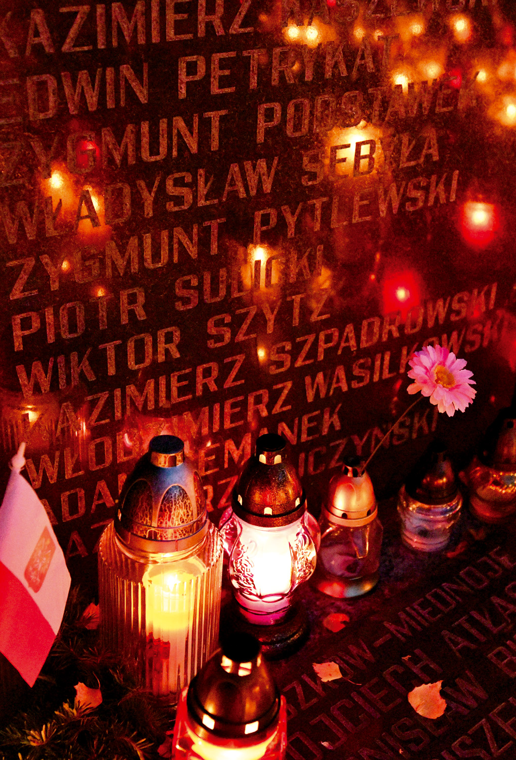 Tablica pamiątkowa upamiętniająca ppłk. Kazimierza Szpądrowskiego na Cmentarzu Kule w Częstochowie